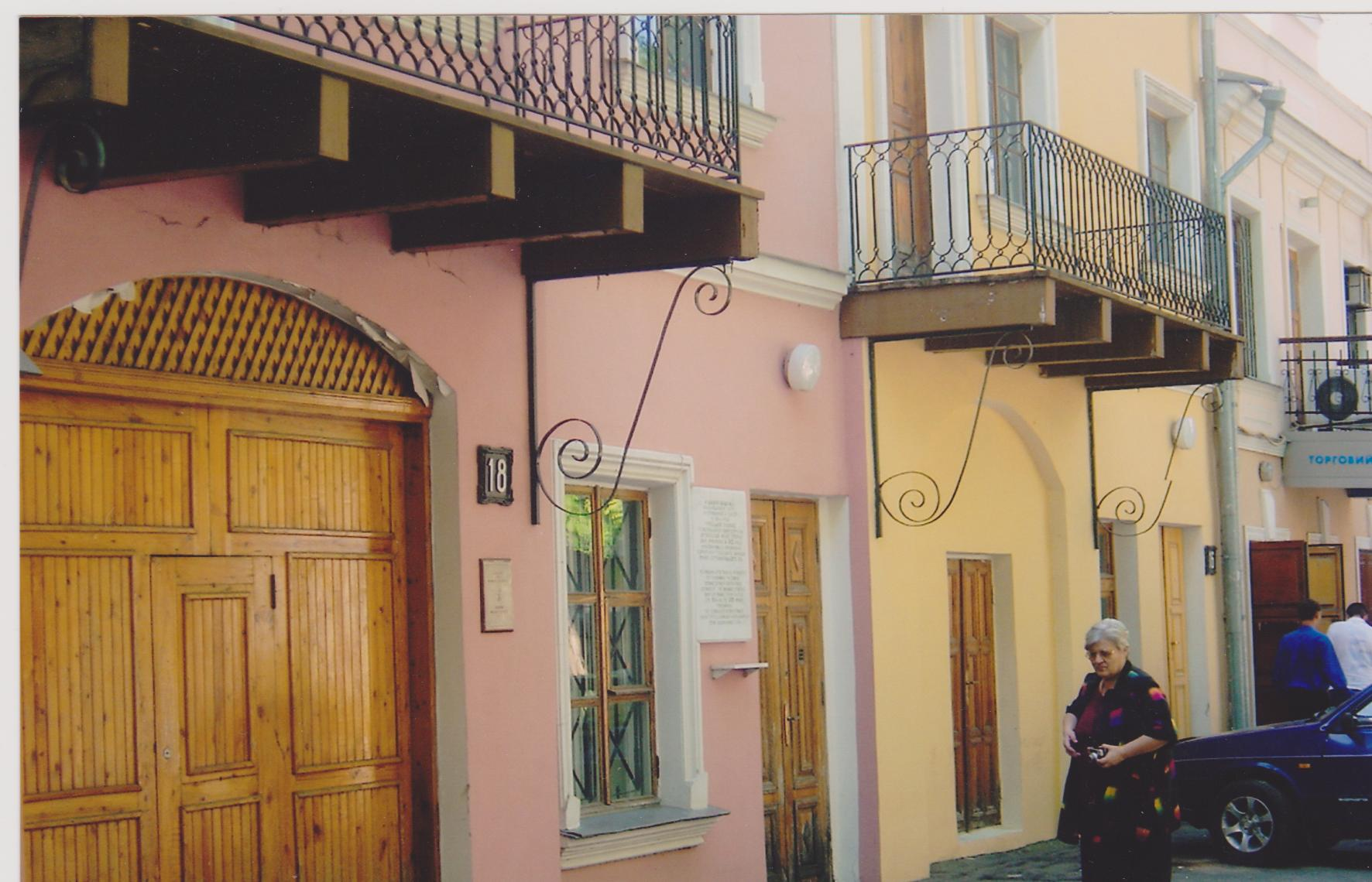 Το Μουσείο Φιλικής Εταιρείας στην Οδησσό, Ουκρανία.